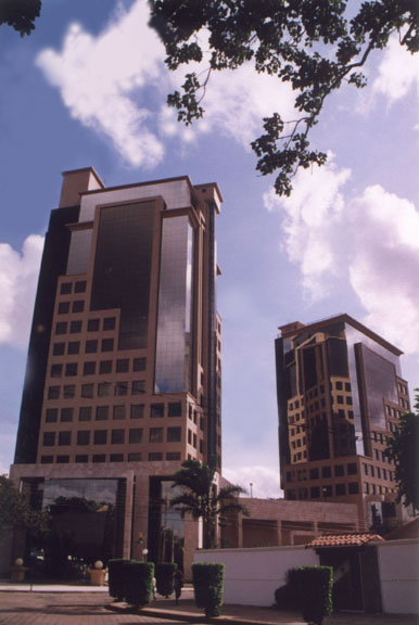 Edificios de las Torres Cainco, sede la de Camara de Industria Comercio y Turismo de la ciudad de Santa Cruz de la Sierra, Bolivia.